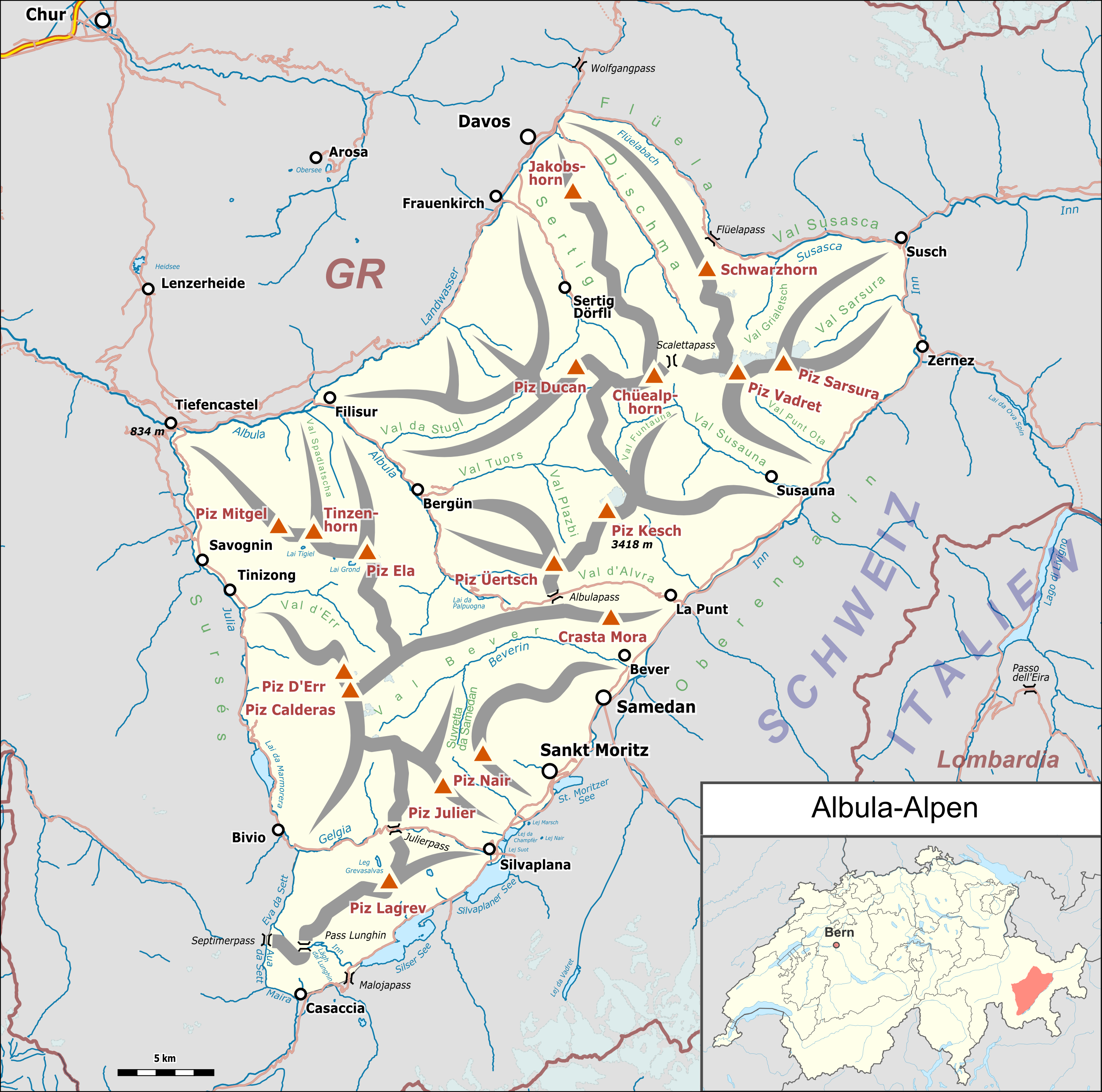 Lagekarte der Albula-Alpen